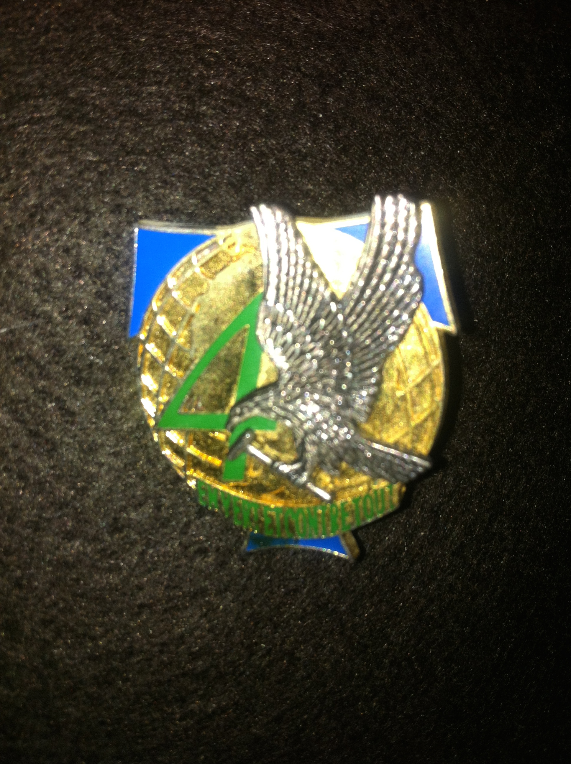 Insigne de la 4eme Cie du 42eme Régiment de Transmissions